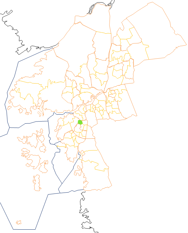 Karta som visar primärområdes belägenhet i Göteborg